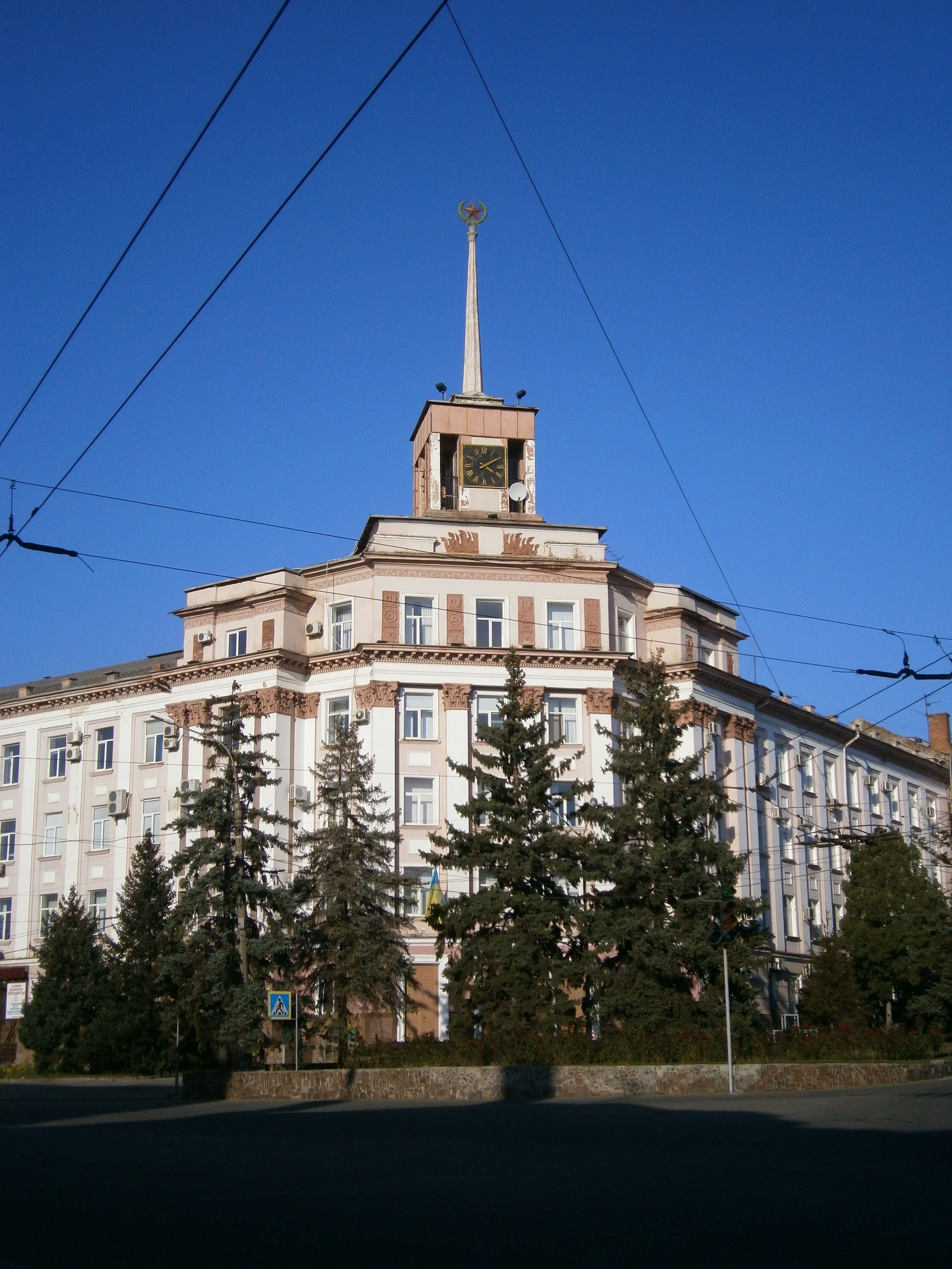 Адмінбудинок рудоуправління виробничого об’єднання “Південруда”, Кривий Ріг, вул. Симбірцева, 2.